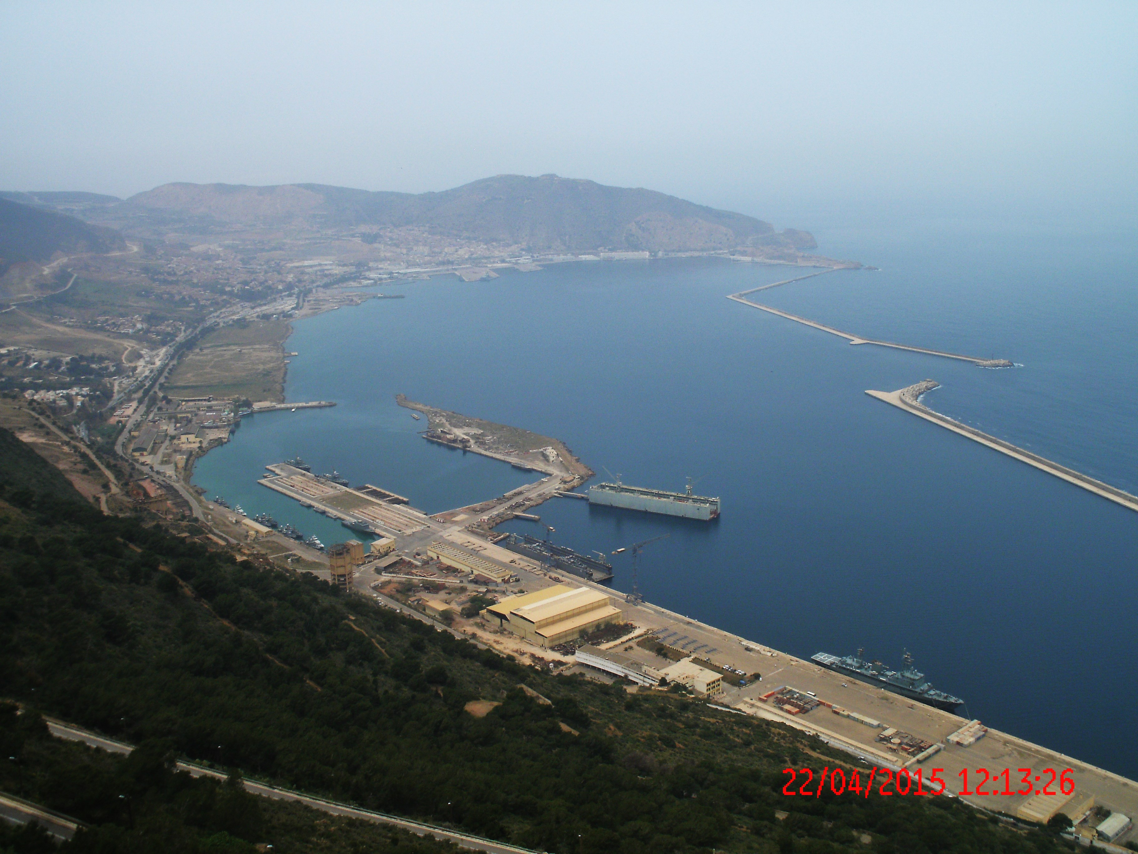 Le port de Mers el Kebir